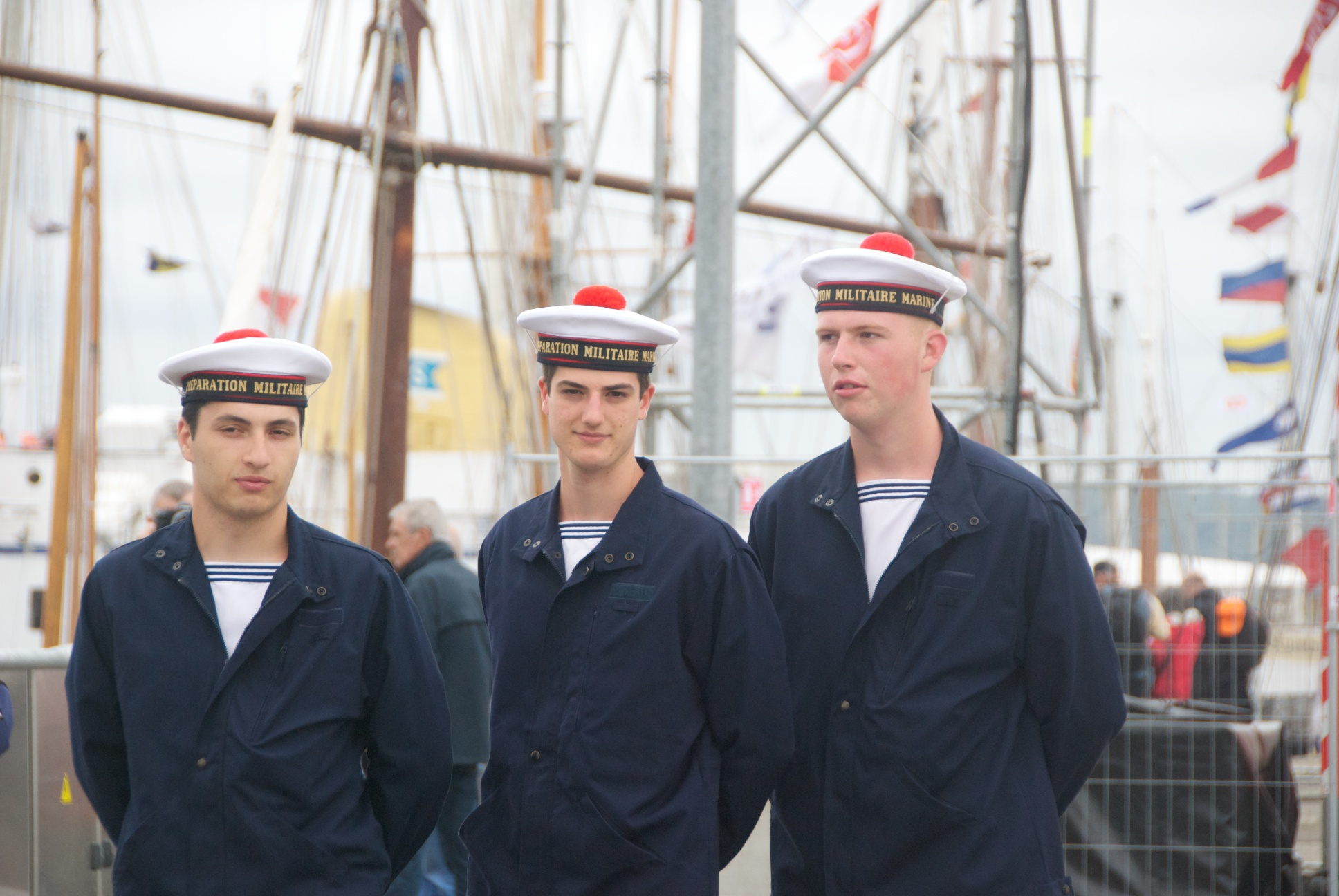 Tonnerres de Brest 2012 Les daltons en costume